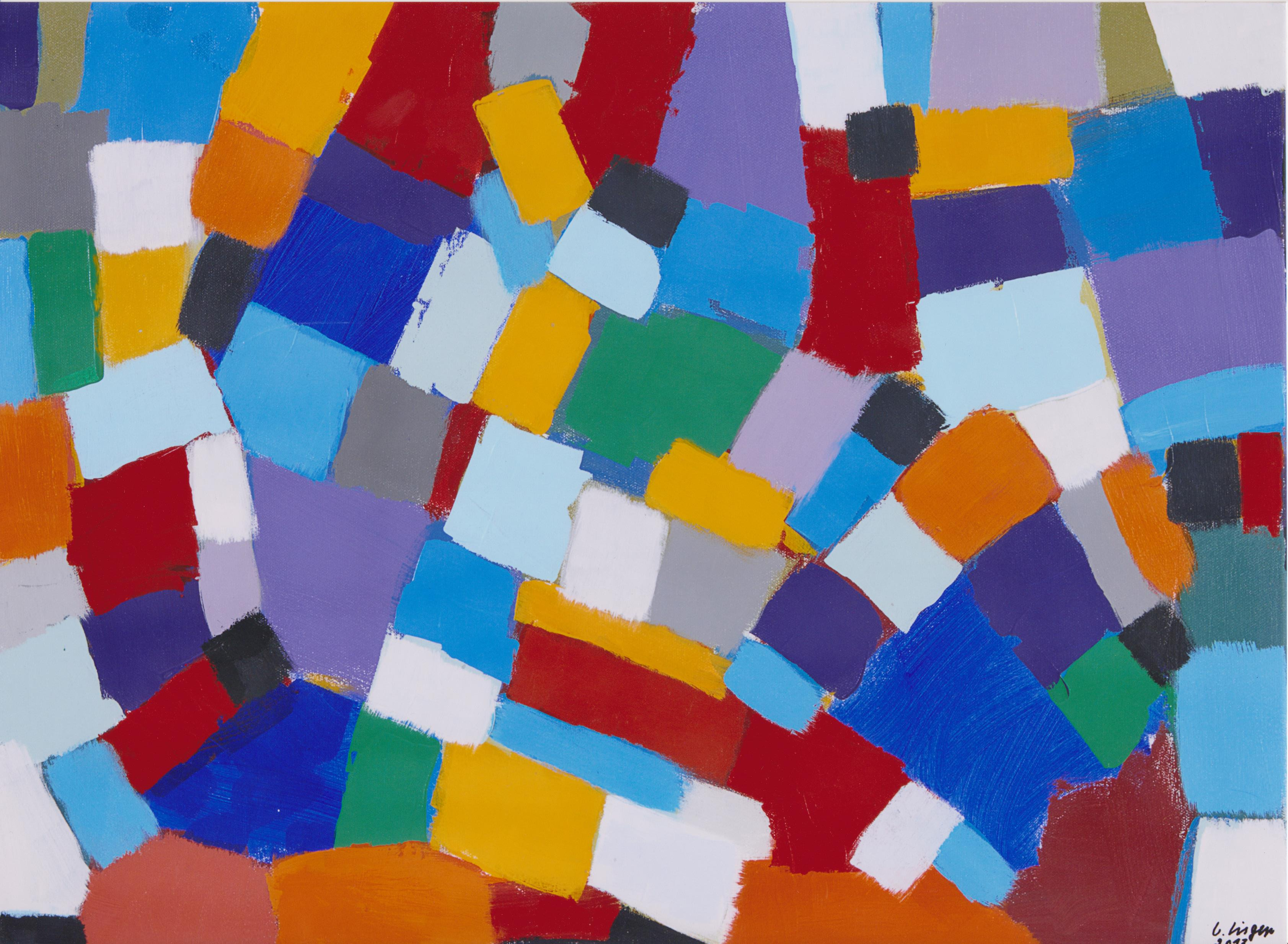 Dieter Sieger, Untitled, 2013